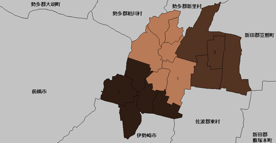 赤堀町の学区。